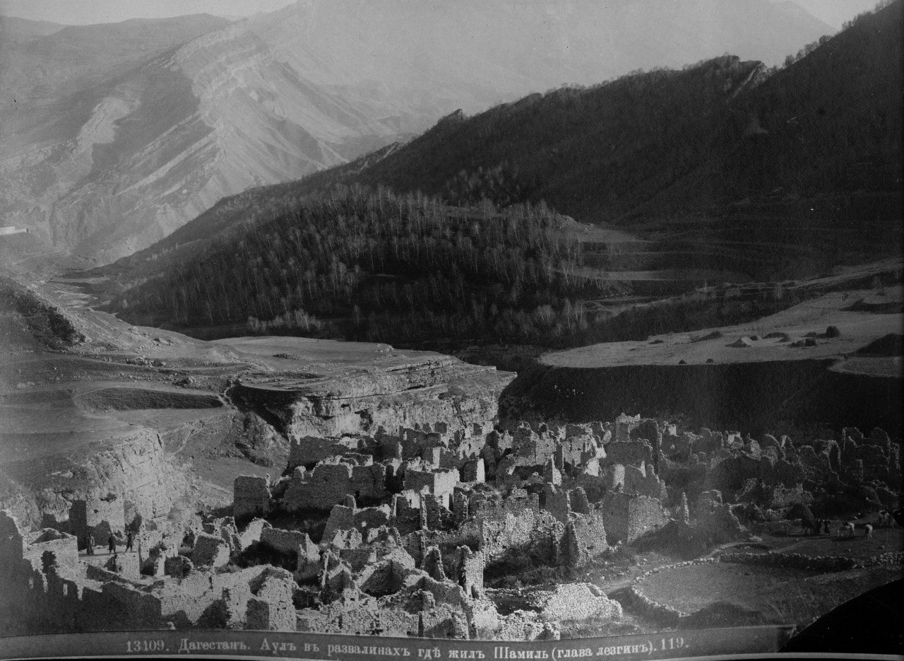 на фотографии изображен аул Гуниб, разрушенный царскими войсками после его взятия в 1859 году